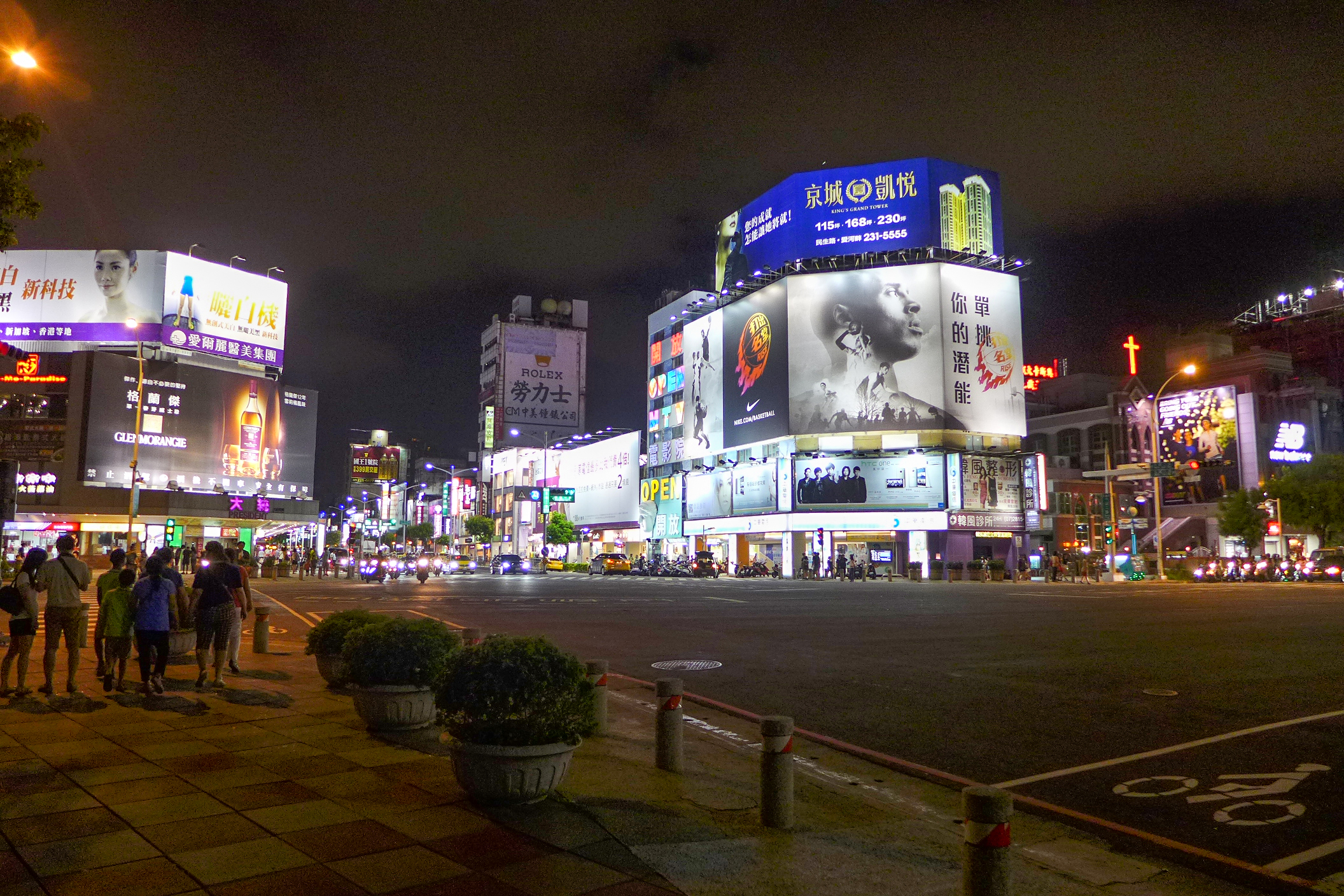 五福二路